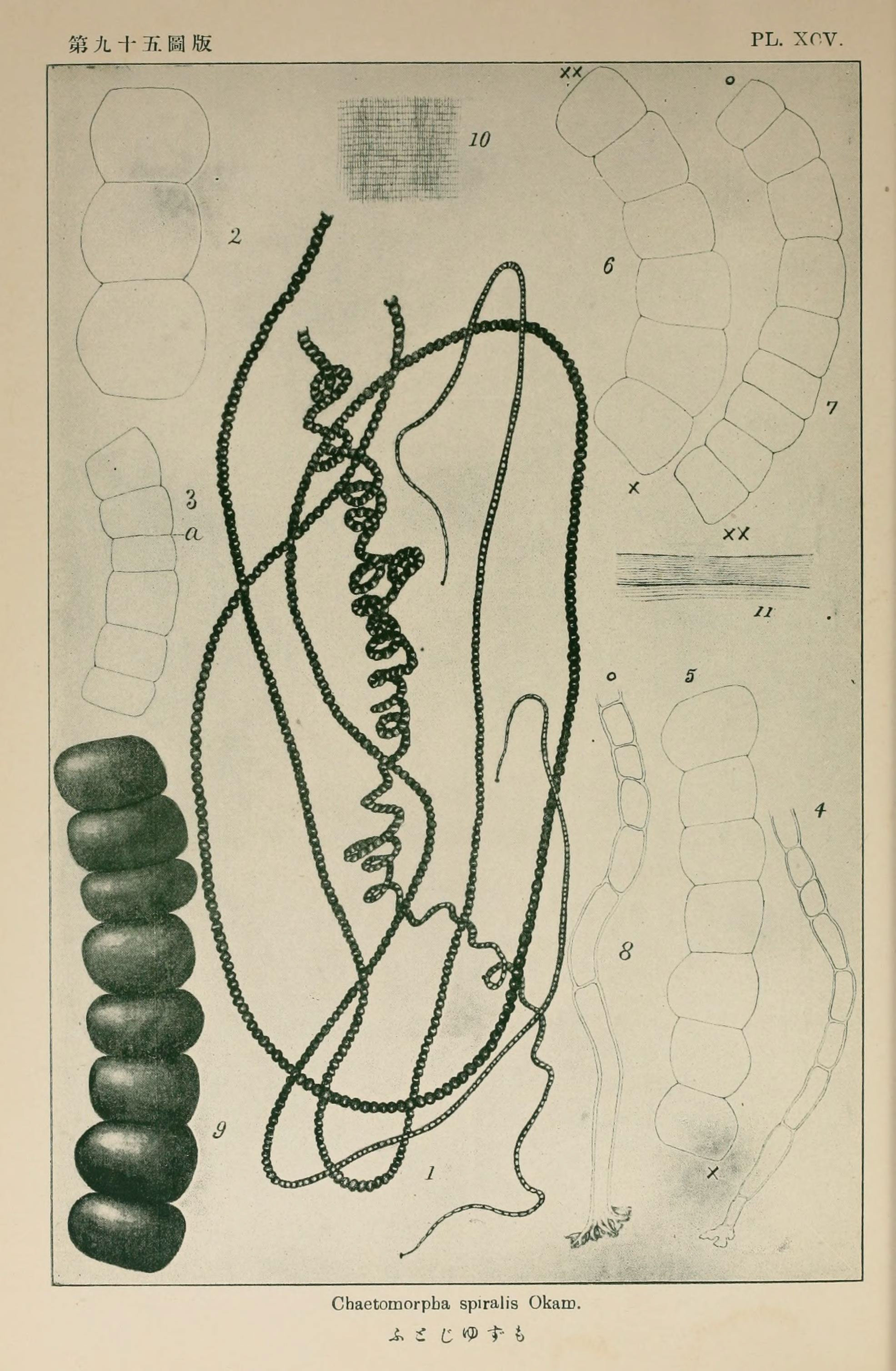 PL. XOV. Chaetomorpba spiralis Okarc. ^ i C ^ t' i